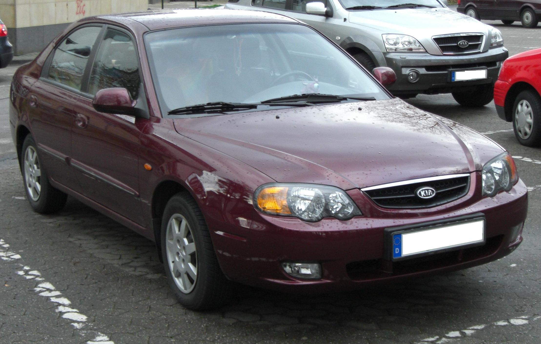 Kia Shuma II